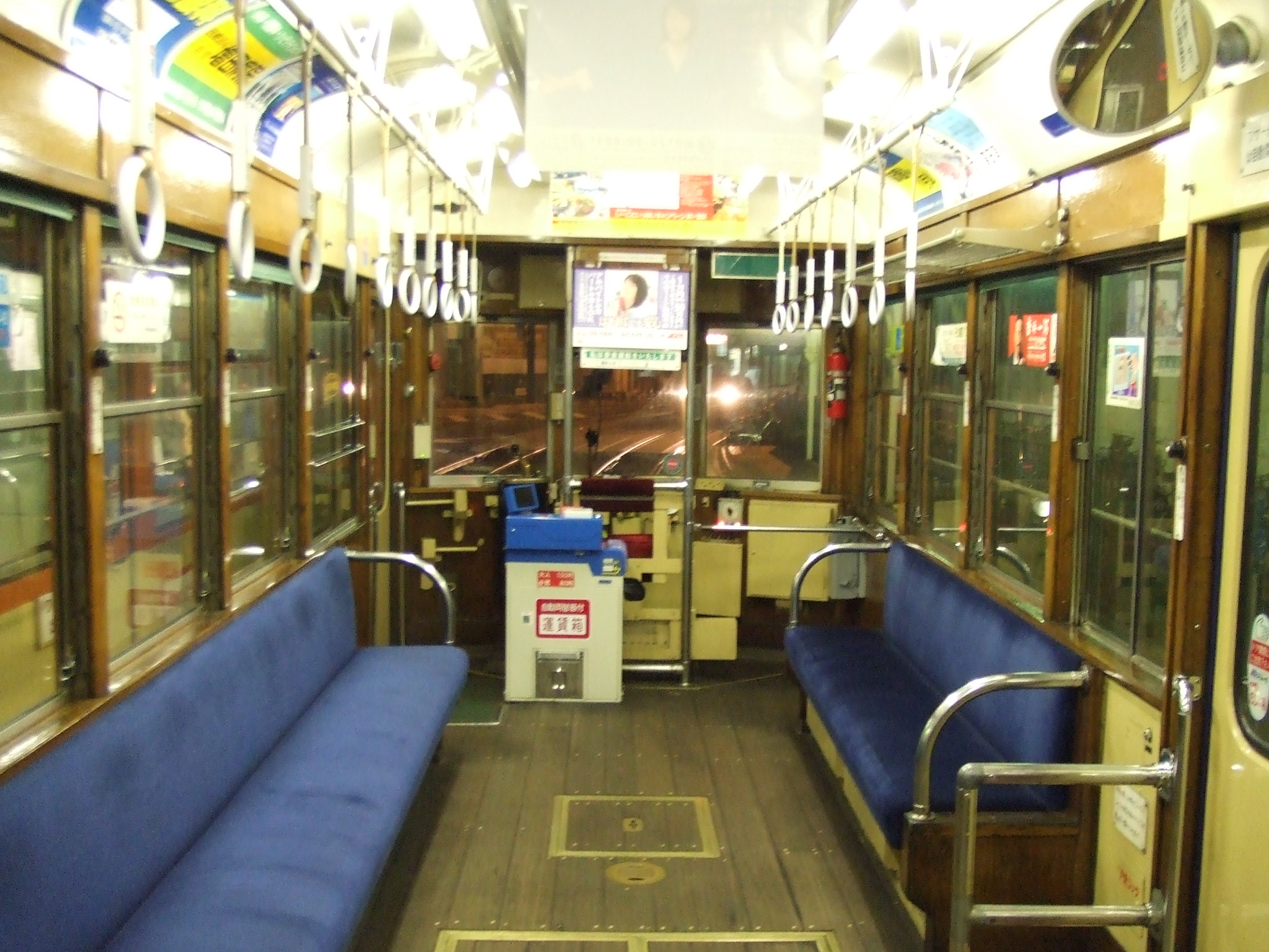 伊予鉄道 モハ50形 車内の様子